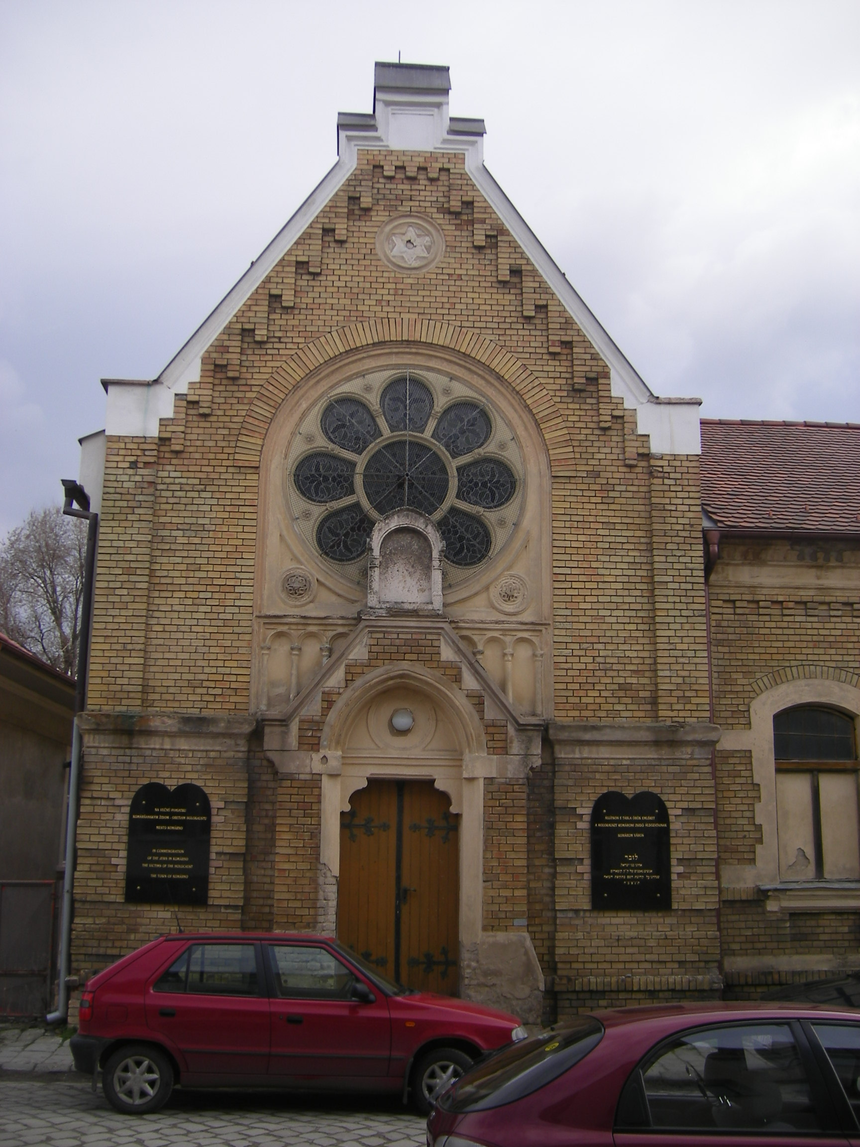 Komárom - az egykori zsinagóga a Štúr (korábban Hajnal) és az Eötvös utca sarkán.